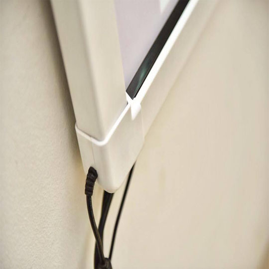 توصيلات